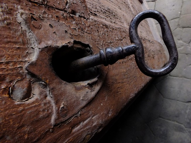 A nagy kulcs egy vidéki házban. Magyar népművészet.